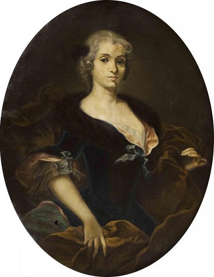 Ritratto di Lavinia Ferrarini Dodi, olio su tela, 119 x 90 cm., coll. privata